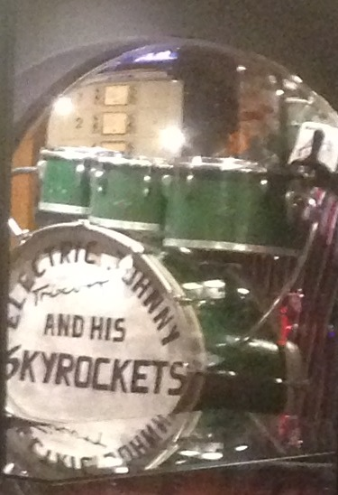 Museum RockArt, Hoek van Holland, Netherlands